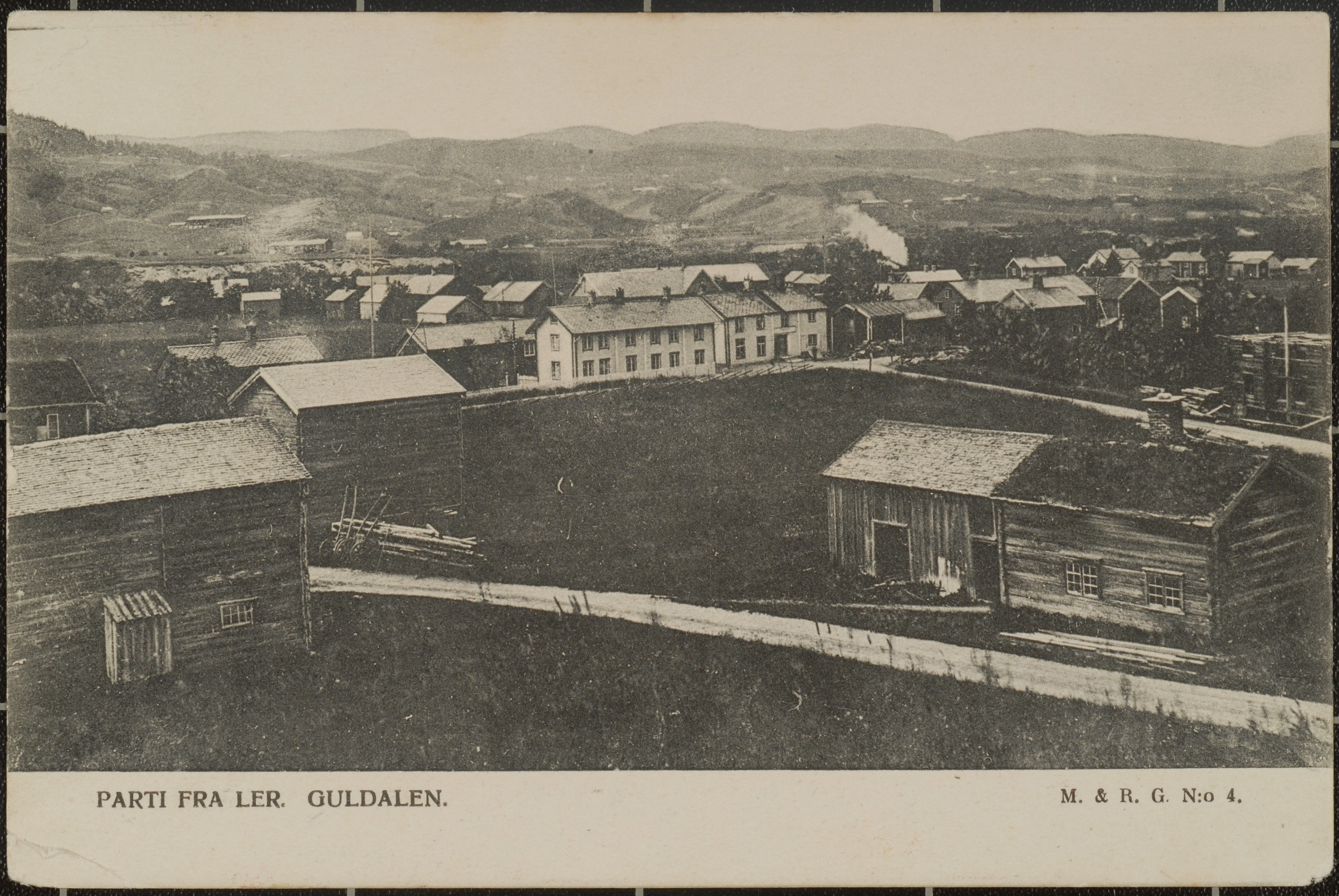 Ler in Melhus, Norway